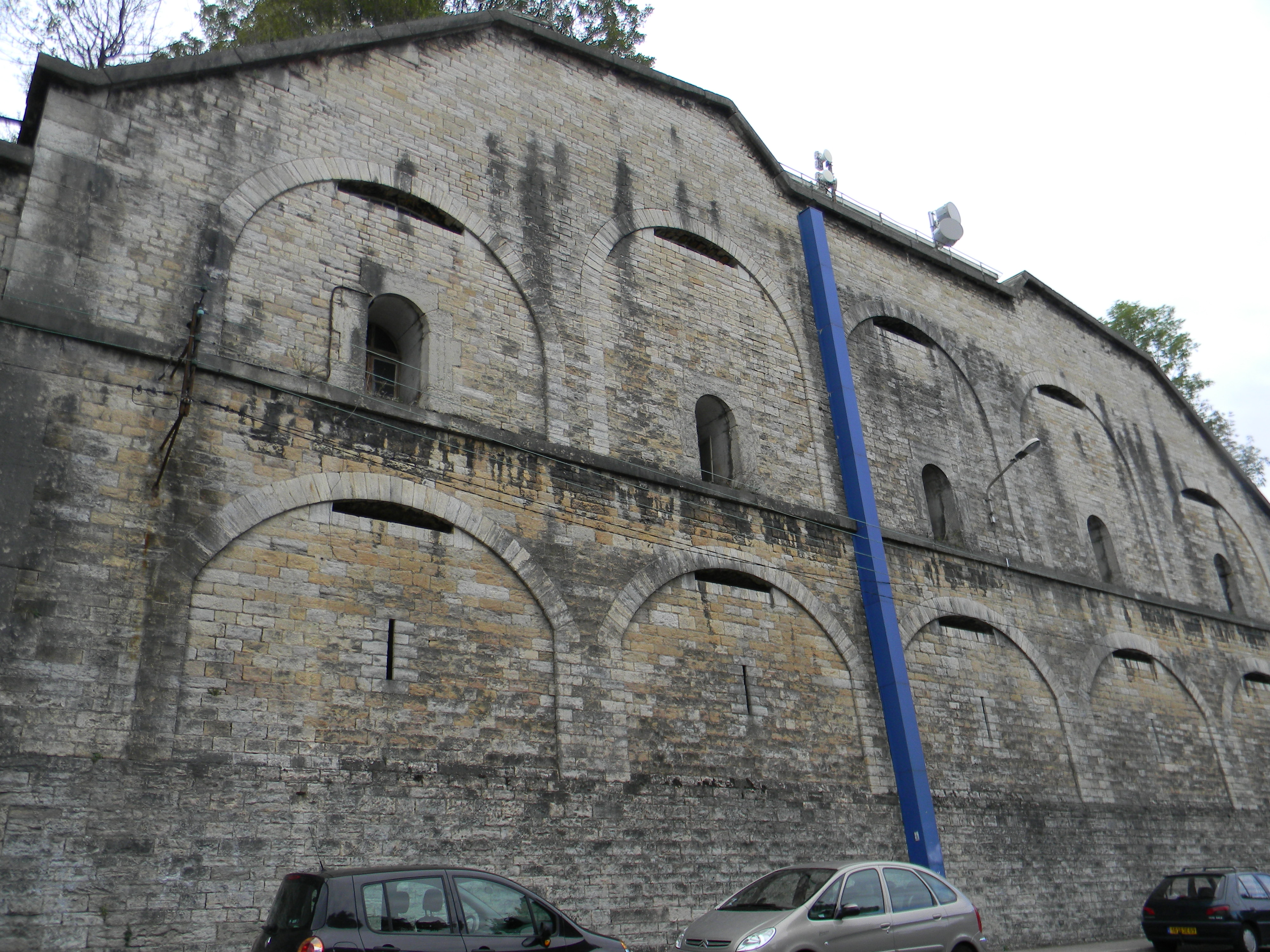 Casemates Haxo au fort de Sainte-Foy.